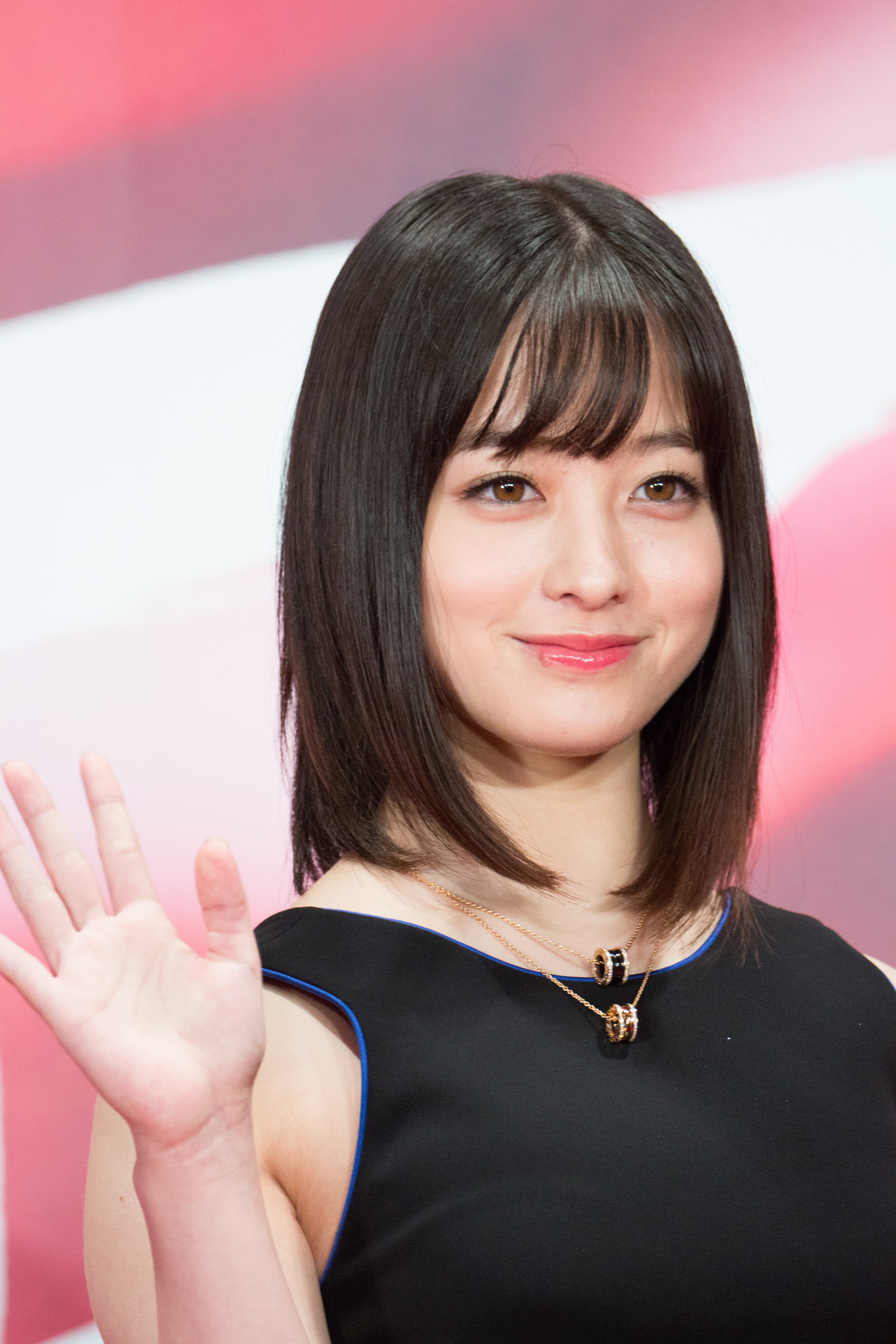 第30回 東京国際映画祭 オープニングセレモニー 橋本環奈